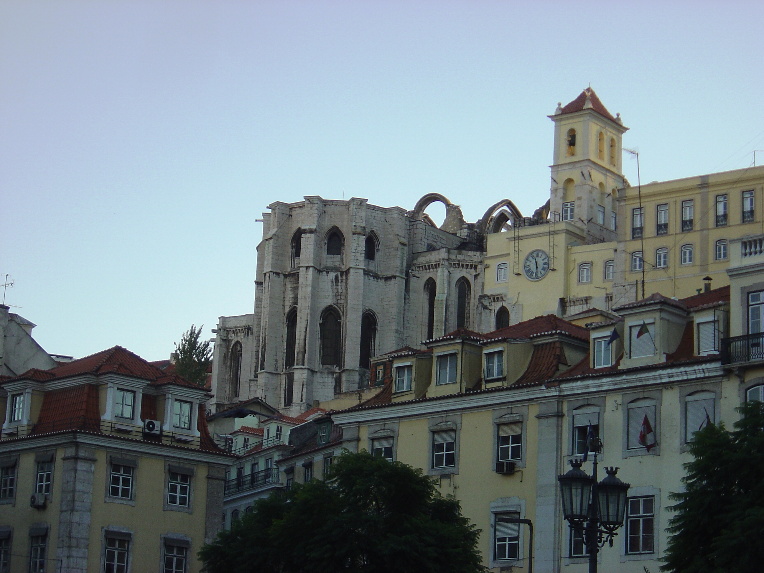 Convento do Carmo ruins, Lisbon, Portugal